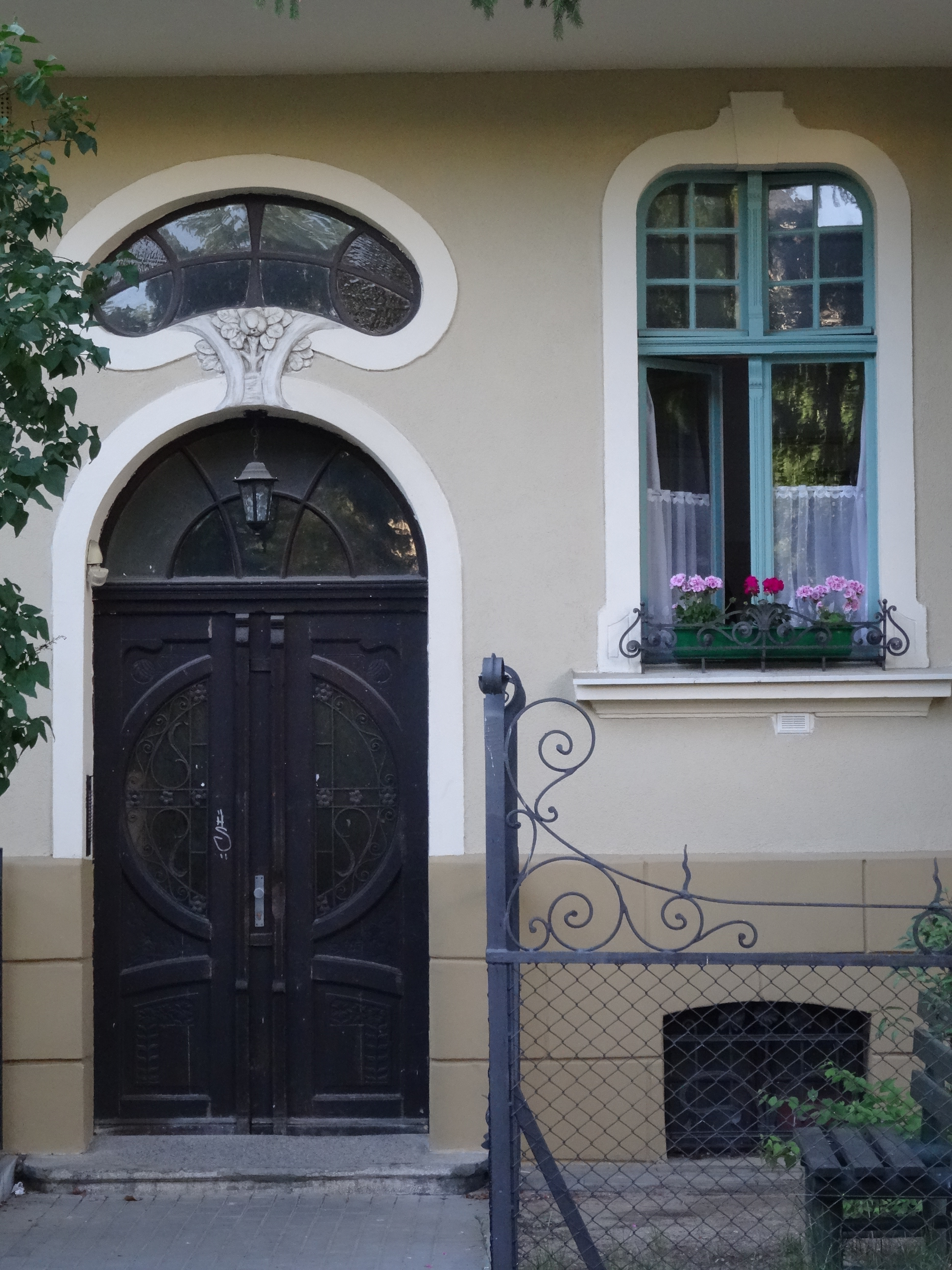 Sopot Dolny, ul. Lipowa 9 - willa, 1900-1904 (wejście)